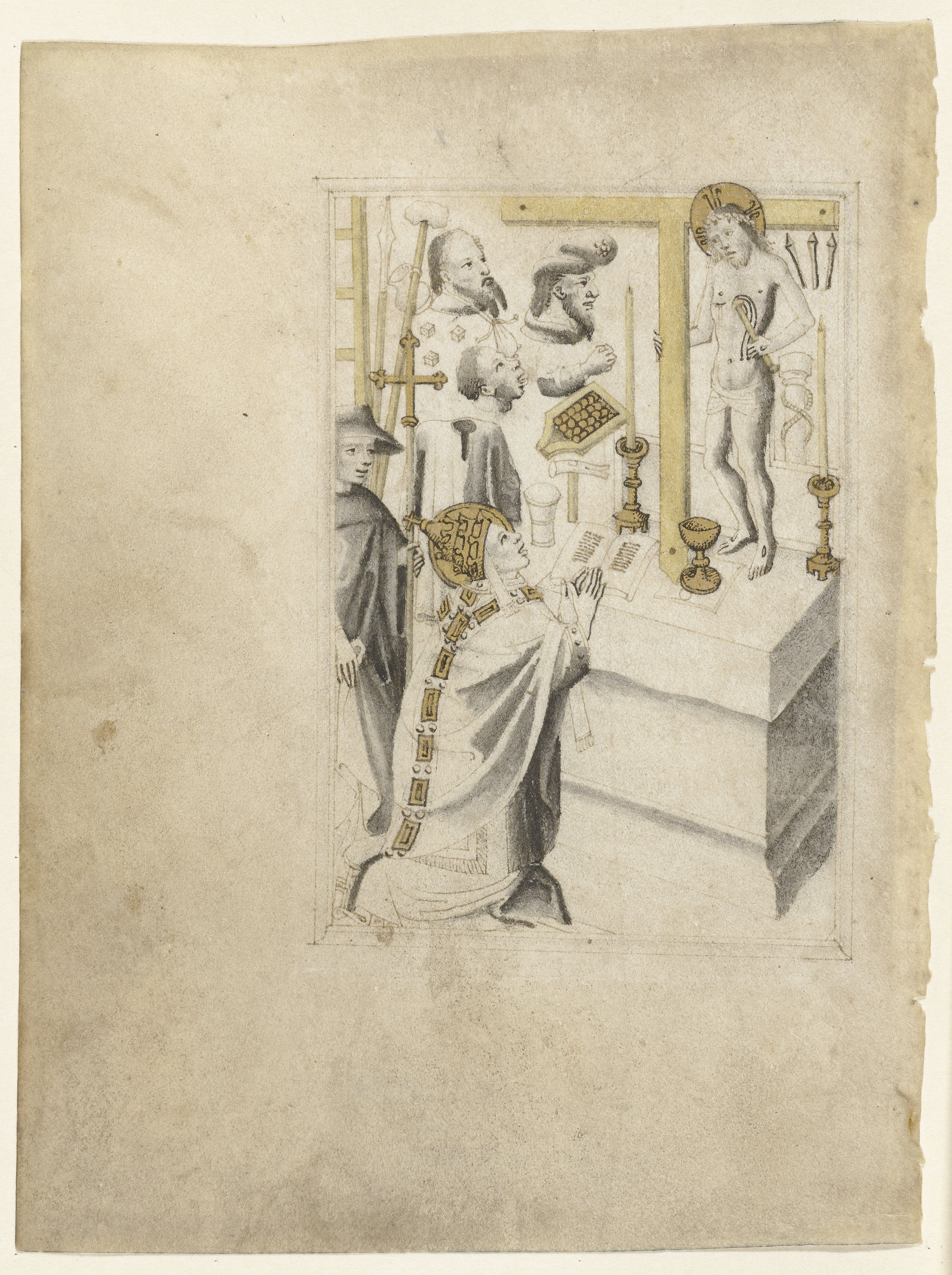 IdentificatieTitel(s): De GregoriusmisObjecttype: miniatuur tekening Objectnummer: RP-T-1963-258VervaardigingVervaardiger: tekenaar: anoniemDatering: ca. 1430 - voor 1448Fysieke kenmerken: penseel in grijs en geel, pen in zwart, bladgoud, op perkamentMateriaal: perkament bladgoud inkt Techniek: pen / penseelAfmetingen: h 93 mm (miniatuur) × b 66 mm (miniatuur) × h 145 mm (blad) × b 110 mm (blad)OnderwerpWat: the mass of St. Gregory the Great: Christ appears above the altar with the instruments of the Passion; maybe blood spouts from Christ's sideVerwerving en rechtenCredit line: Schenking van Kunsthandel Otto WertheimerVerwerving: schenking 1963Copyright: Publiek domein